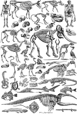 Aspect de différents squelettes